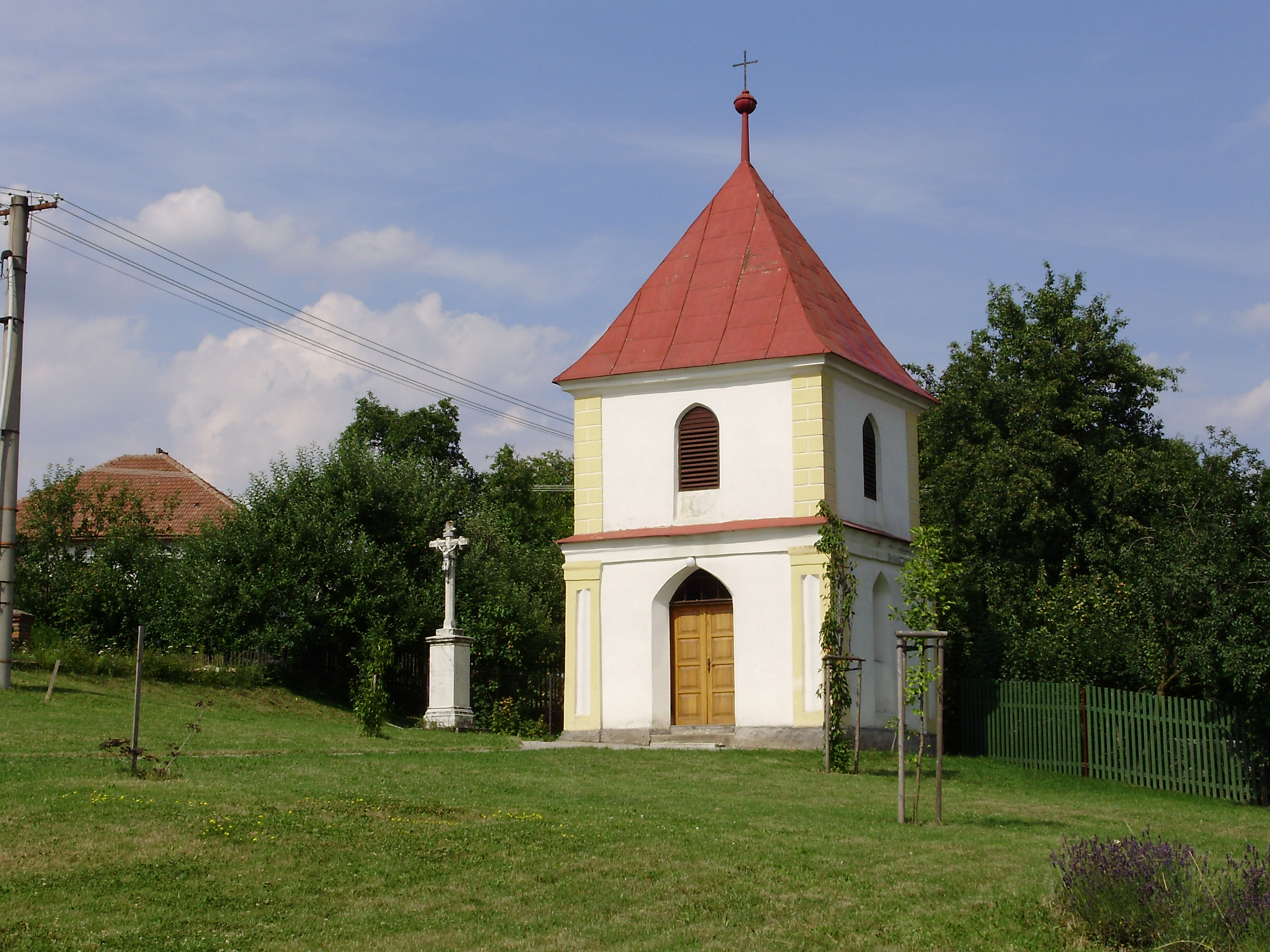 Sejřek - kaple (Czech republic)